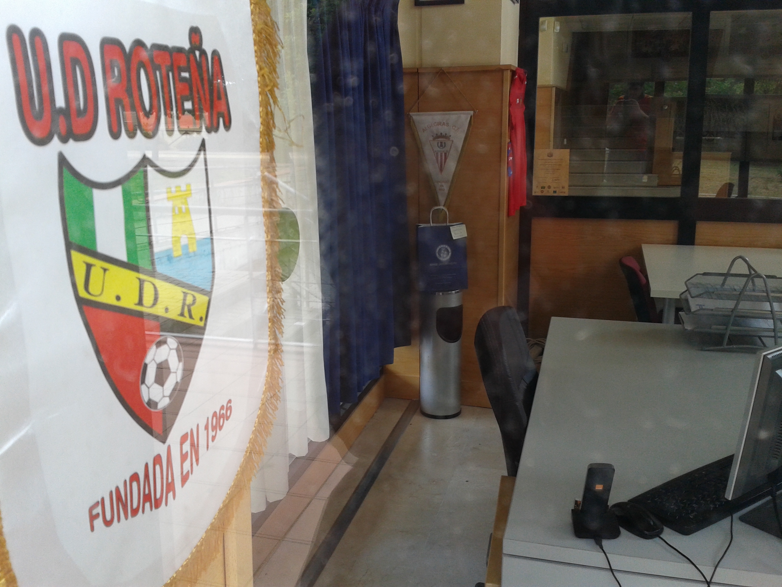 Banderines de UD Roteña y Algeciras CF en las oficinas del Xerez DFC